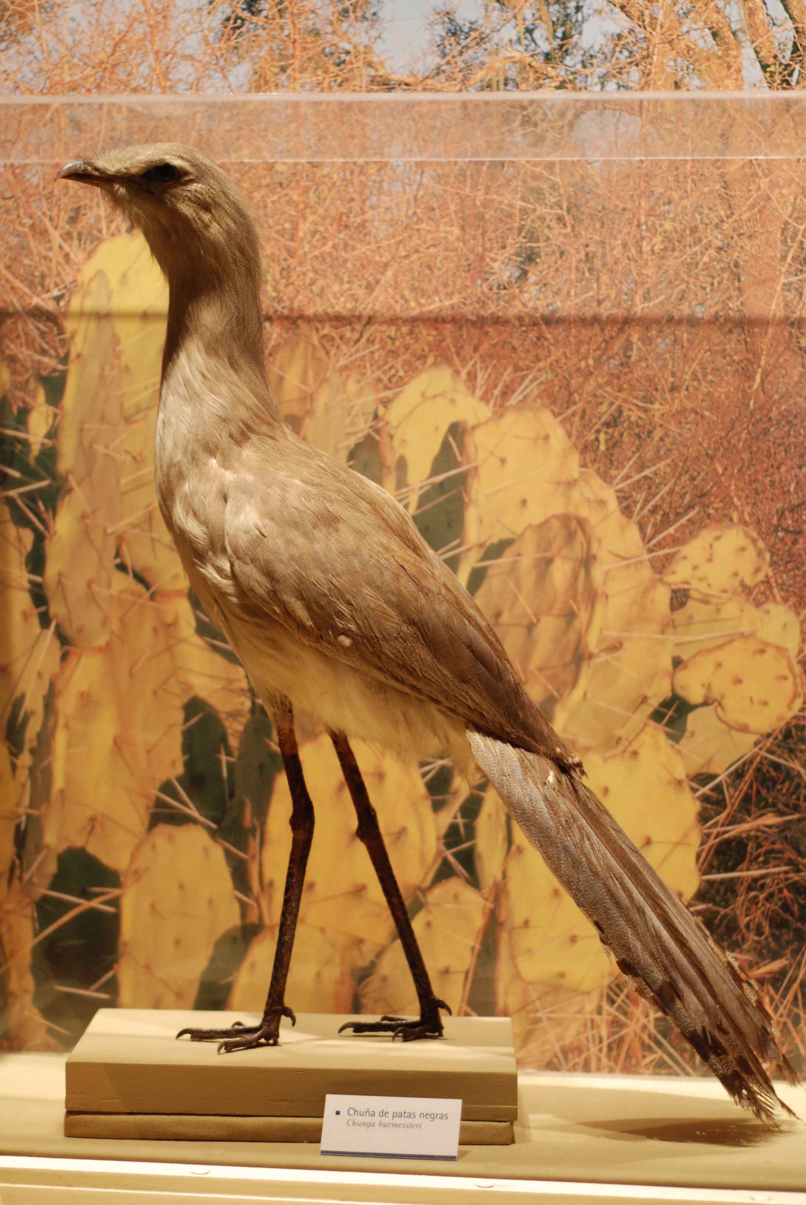 Chunga burmeisteri. Chuña de patas negra.